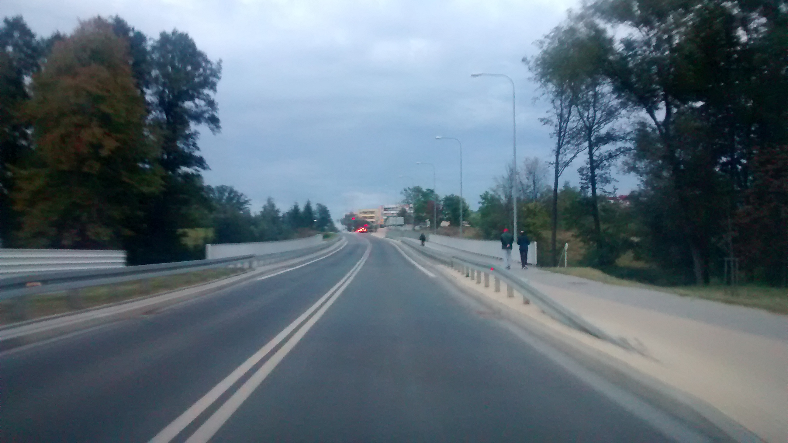 Most łączący ul. Łowicką z Waryńskiego